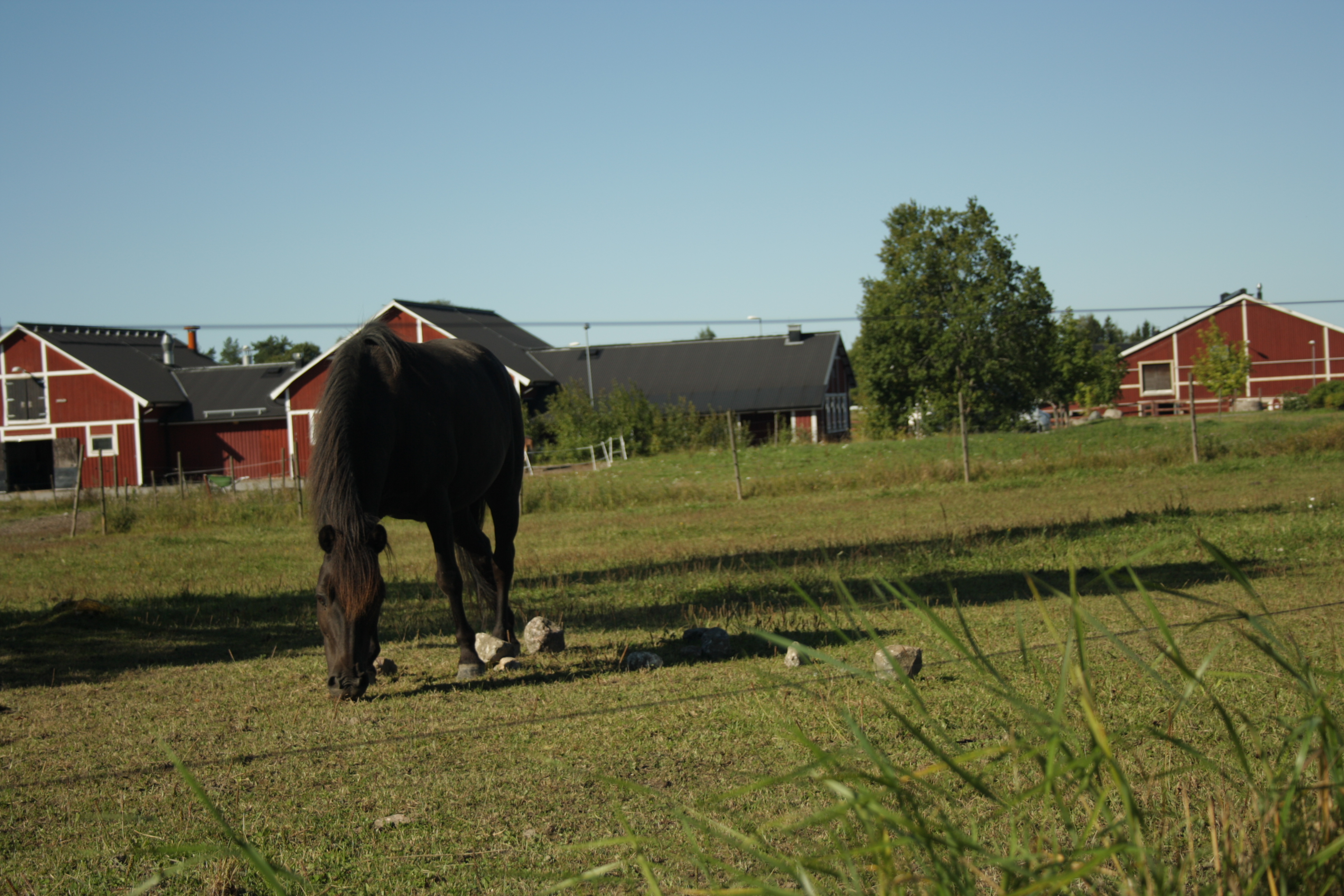 En bild från hästhagen vid Kvinnerstaskolan